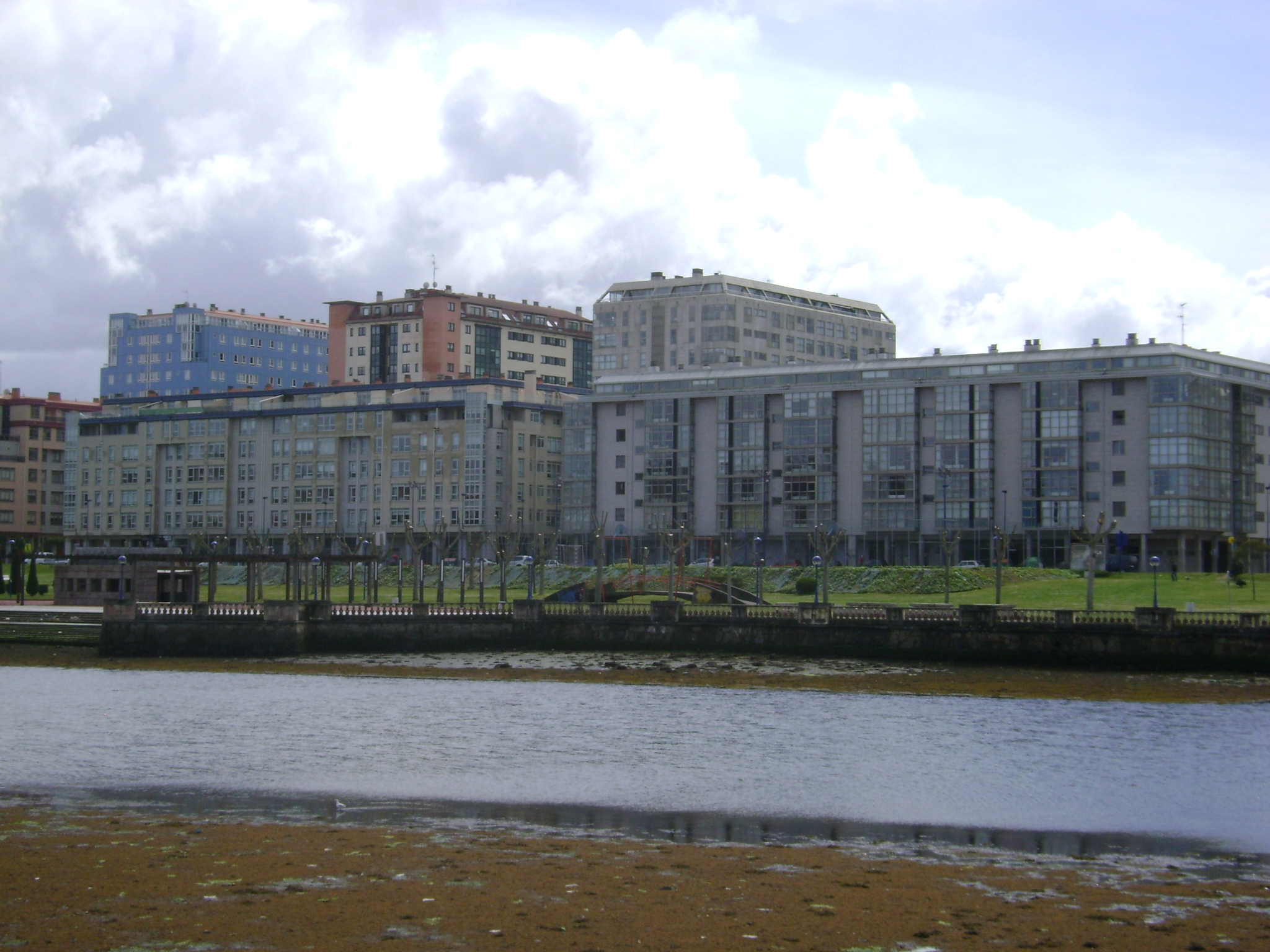 Culleredo, La Coruña, España